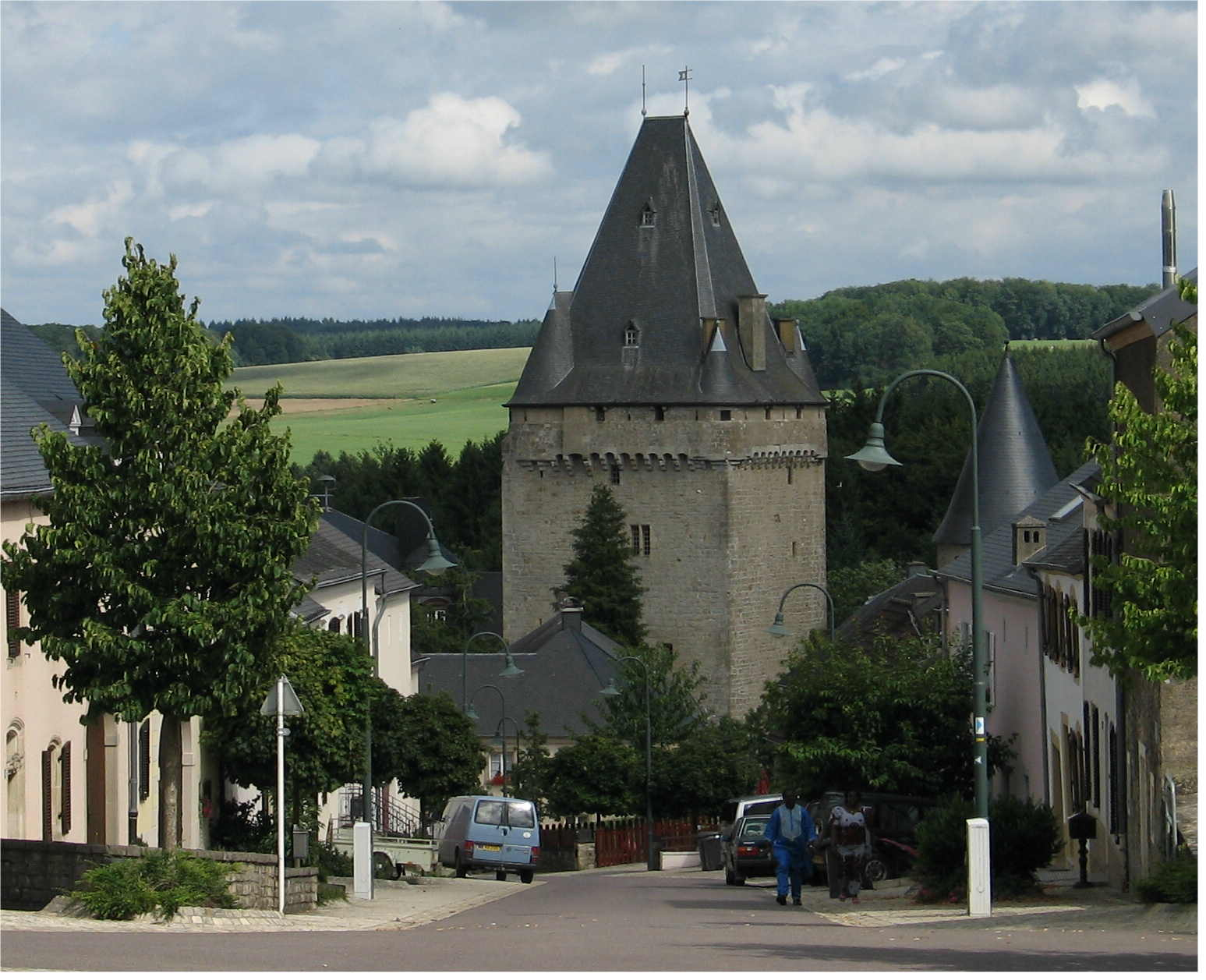 Hollenfels et son château